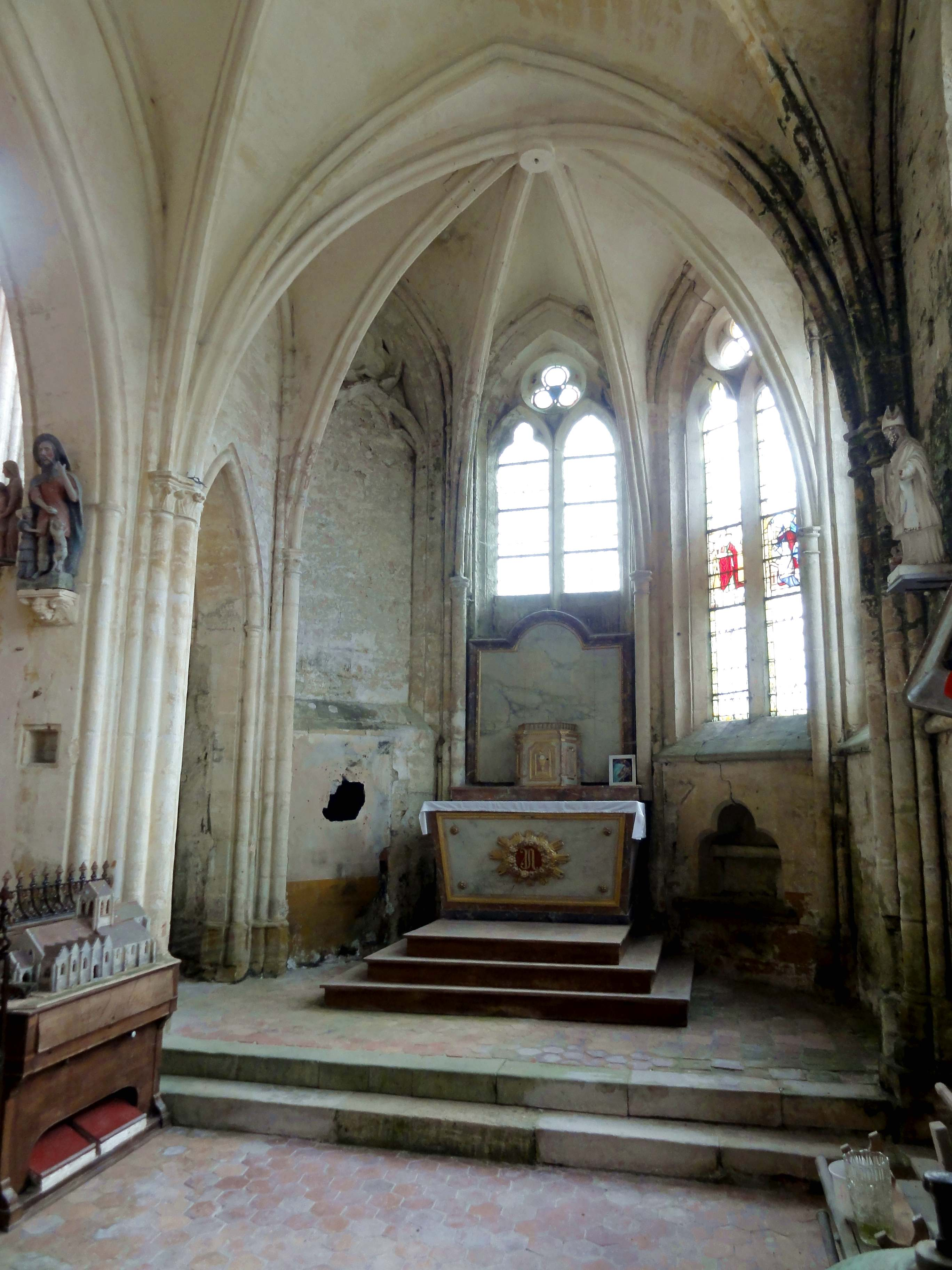 Intérieur de l'église (voir titre).